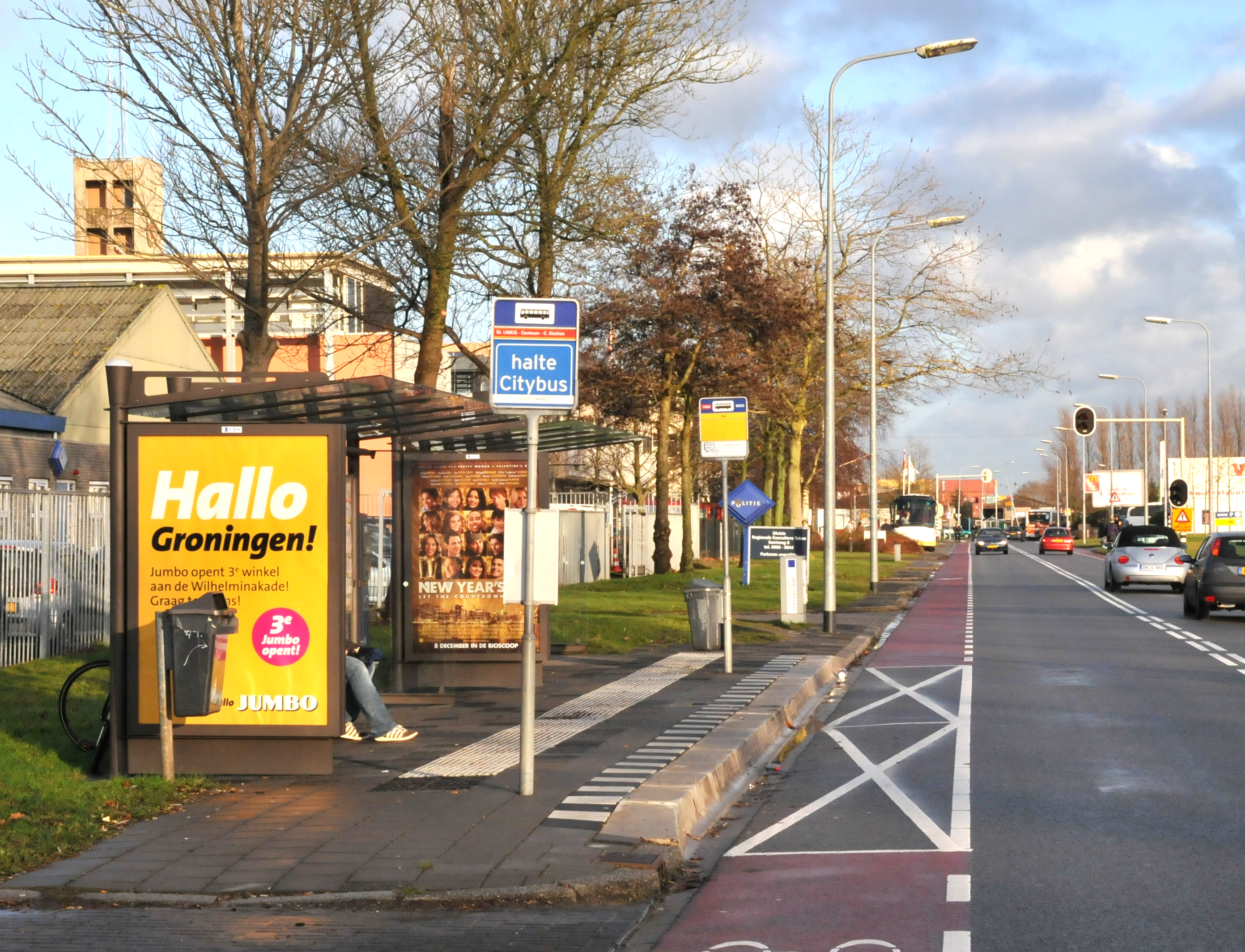 Bushalte perron met wielgeleidende trottoirbanden te Groningen.